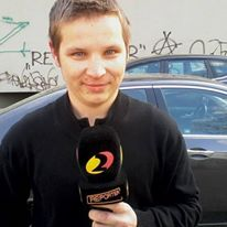 Reimo Sillamaa Reporteris